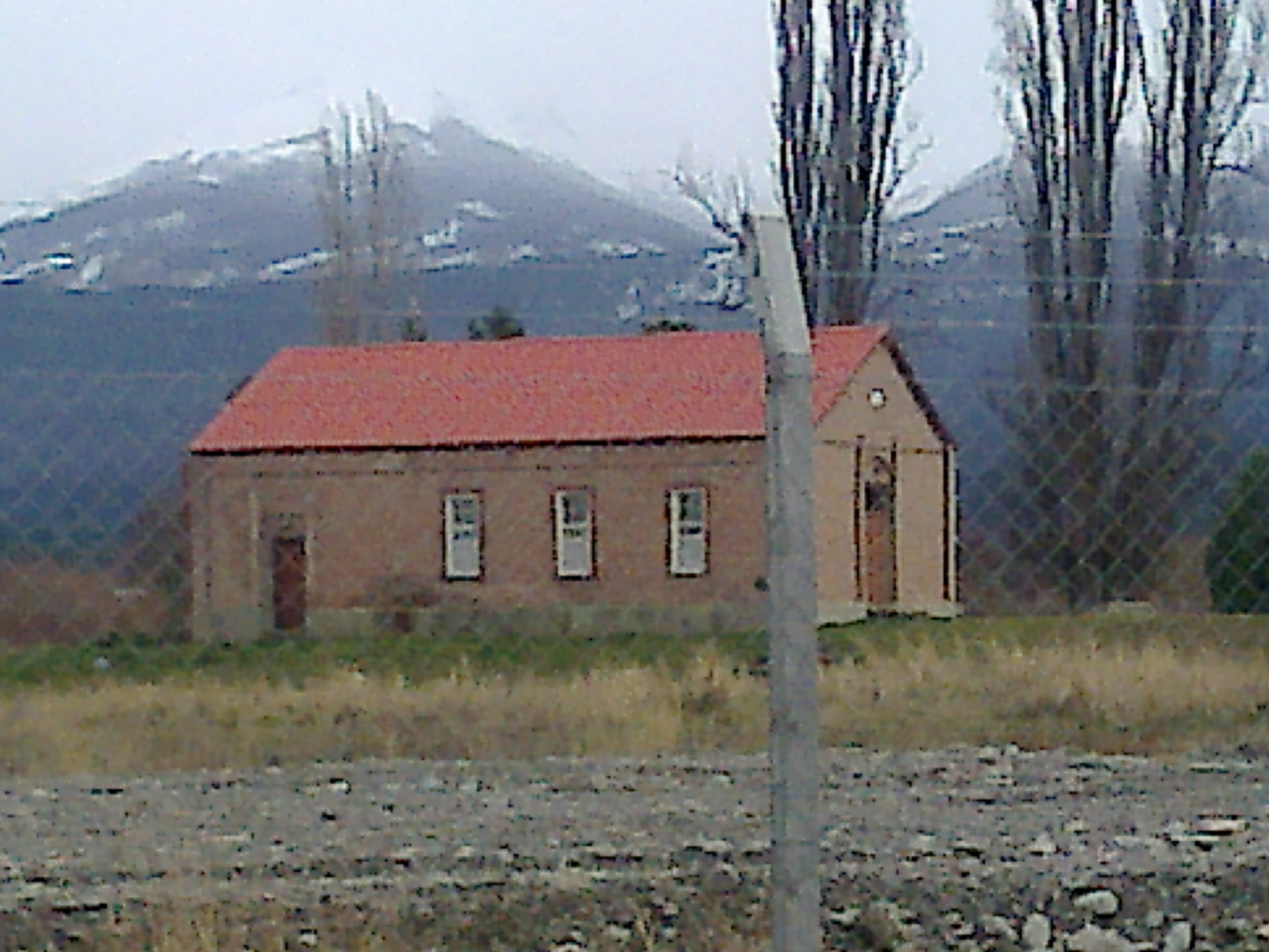 trevelin